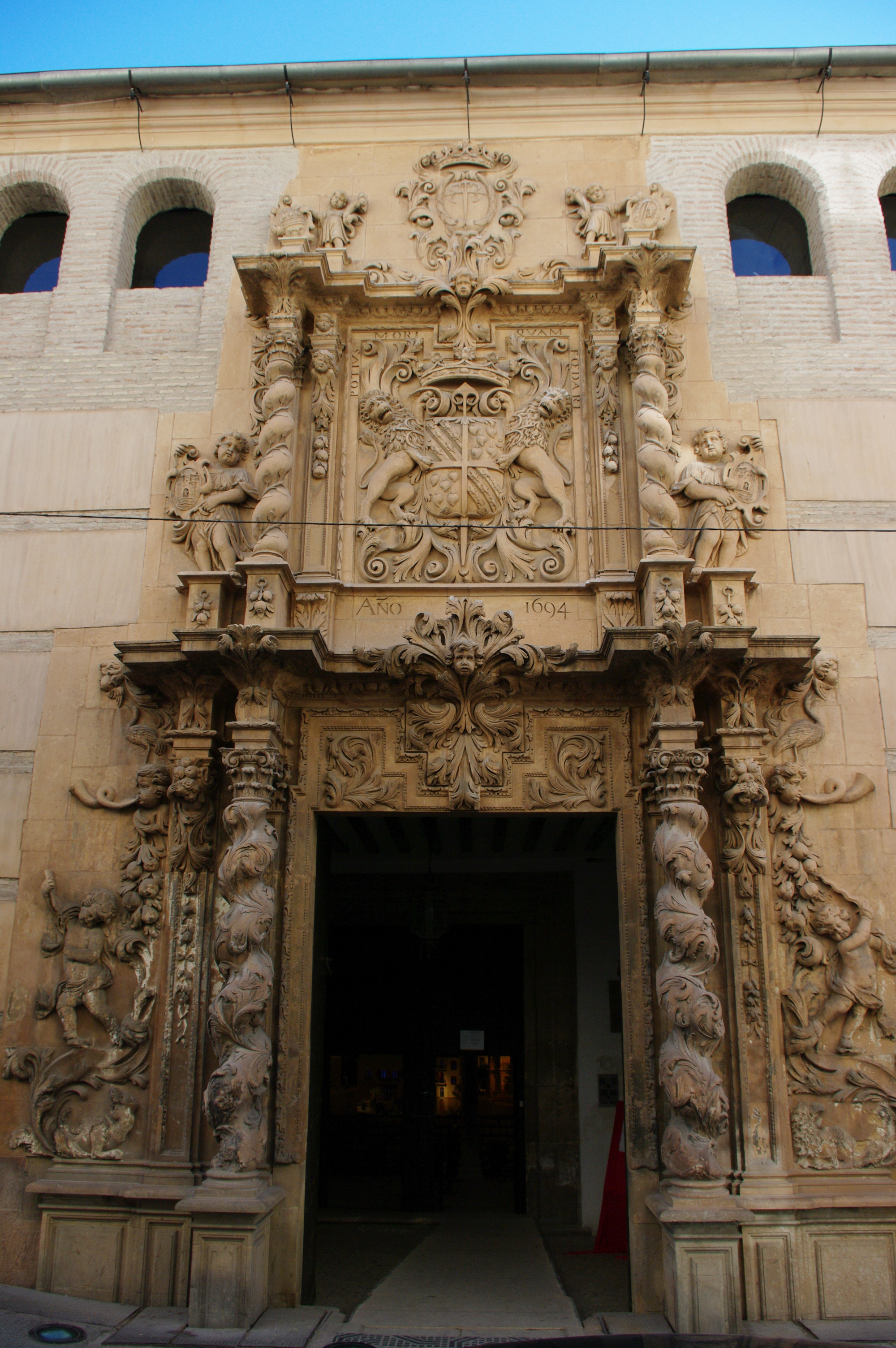 Fachada del Palacio de Guevara en Lorca (Murcia)